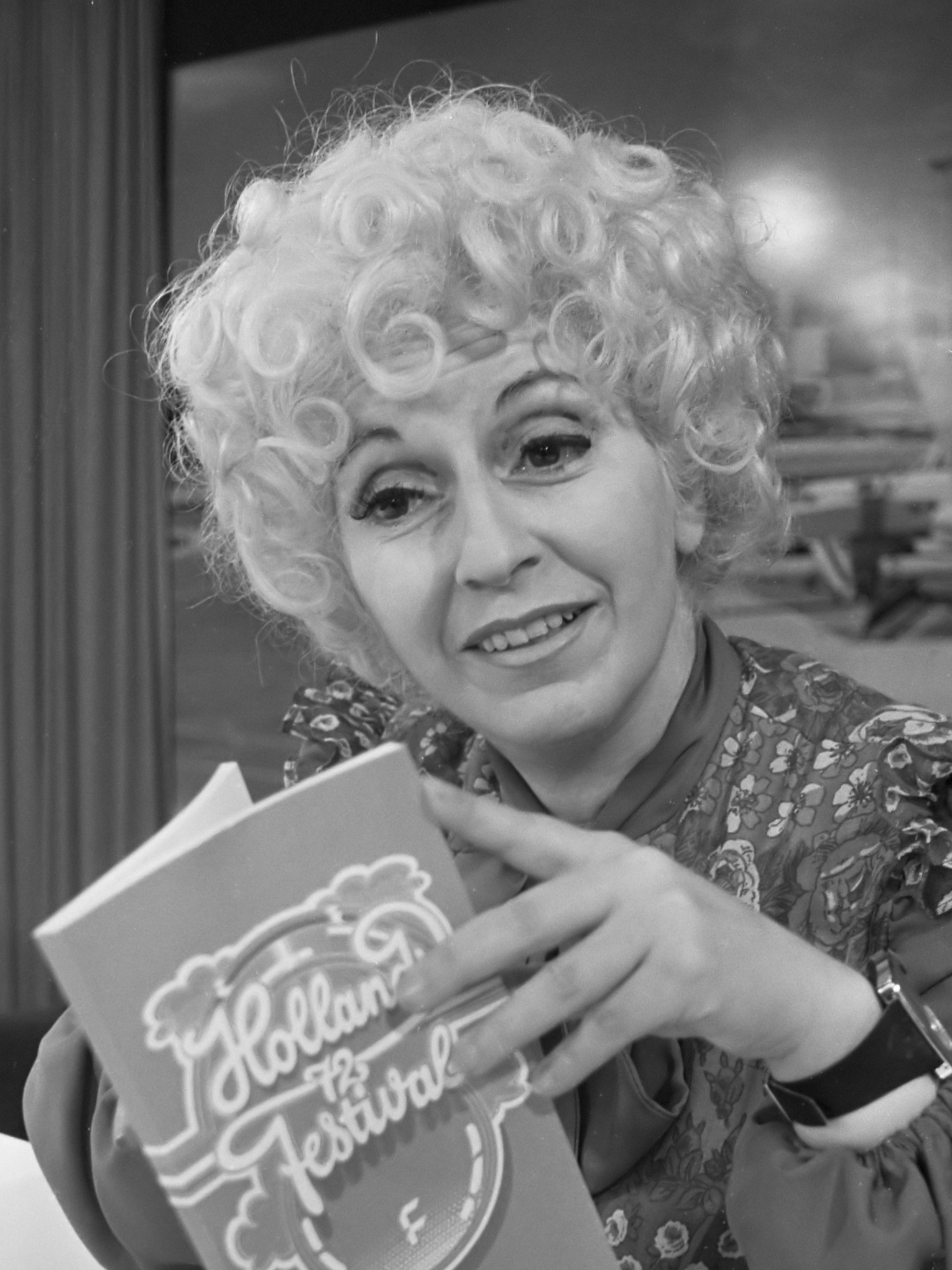 Zangeres Cathy Berberian (sopraan) arriveert op Schiphol voor het Hollandfestival 1972 12 juni 1972